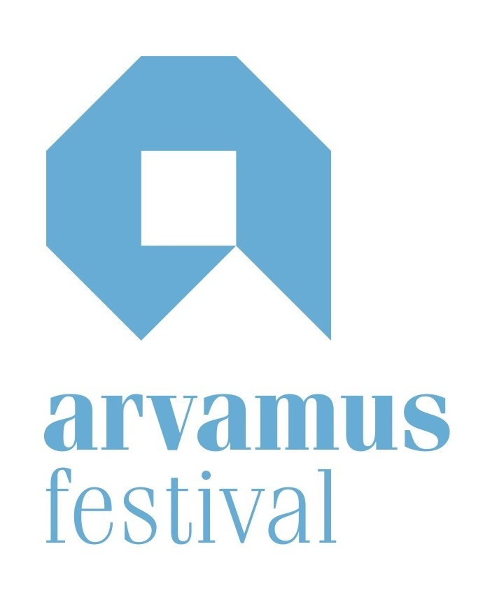 Ametlik logo